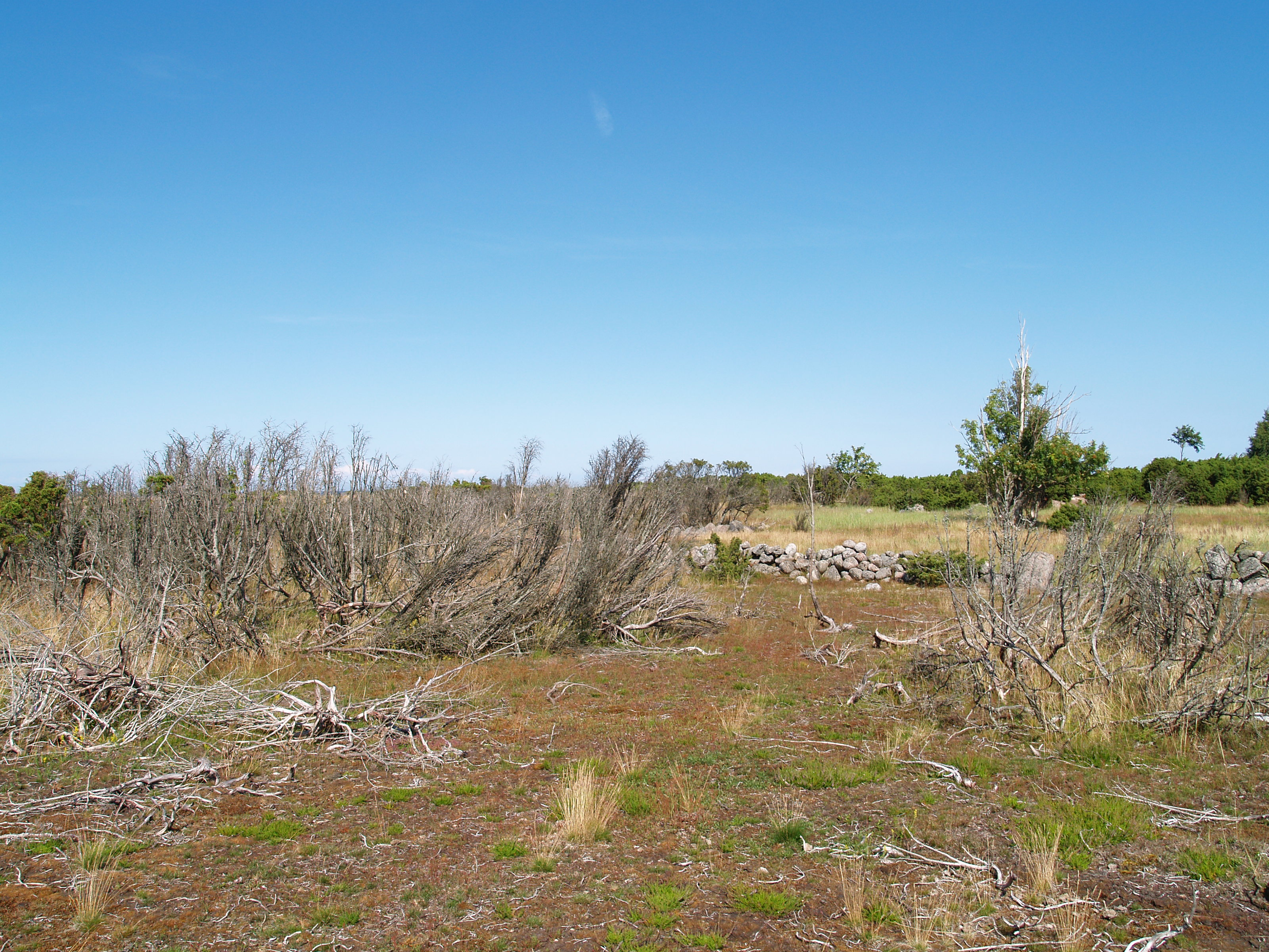 Põlenud puud Aksi saarel.